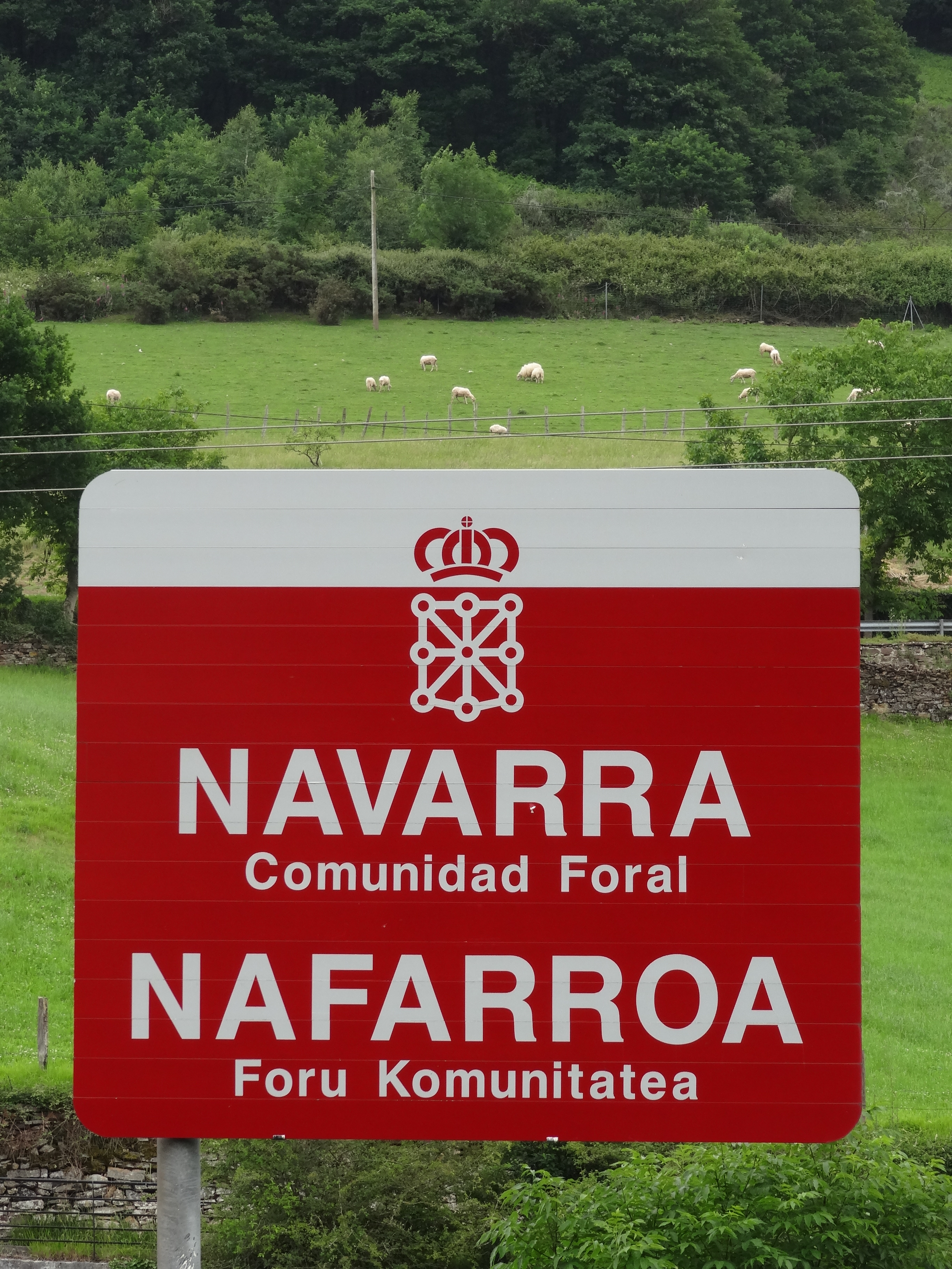 Comunidad Foral de Navarra